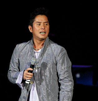 Alan Tam